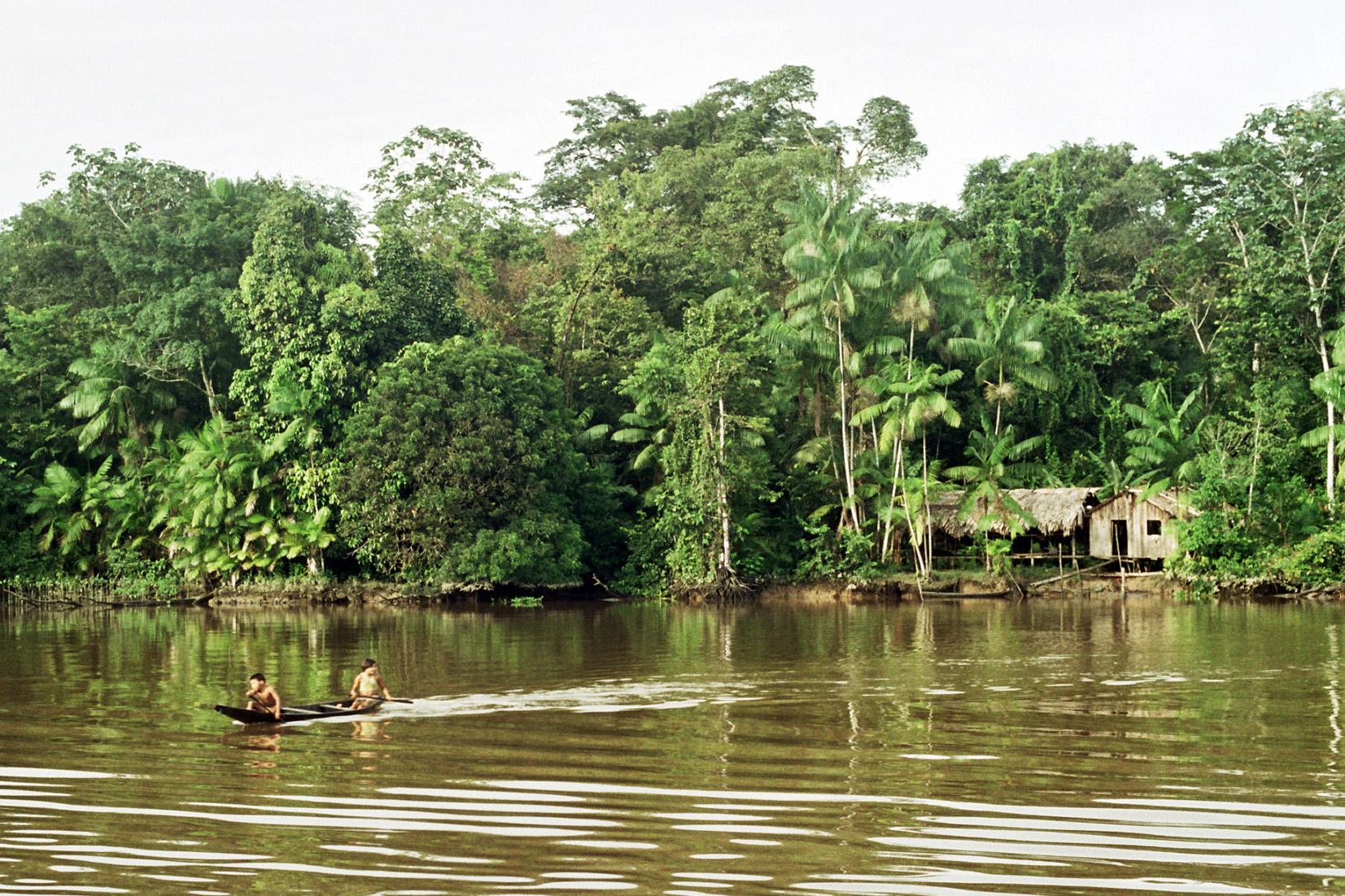 Uma típica casa da Amazônia.